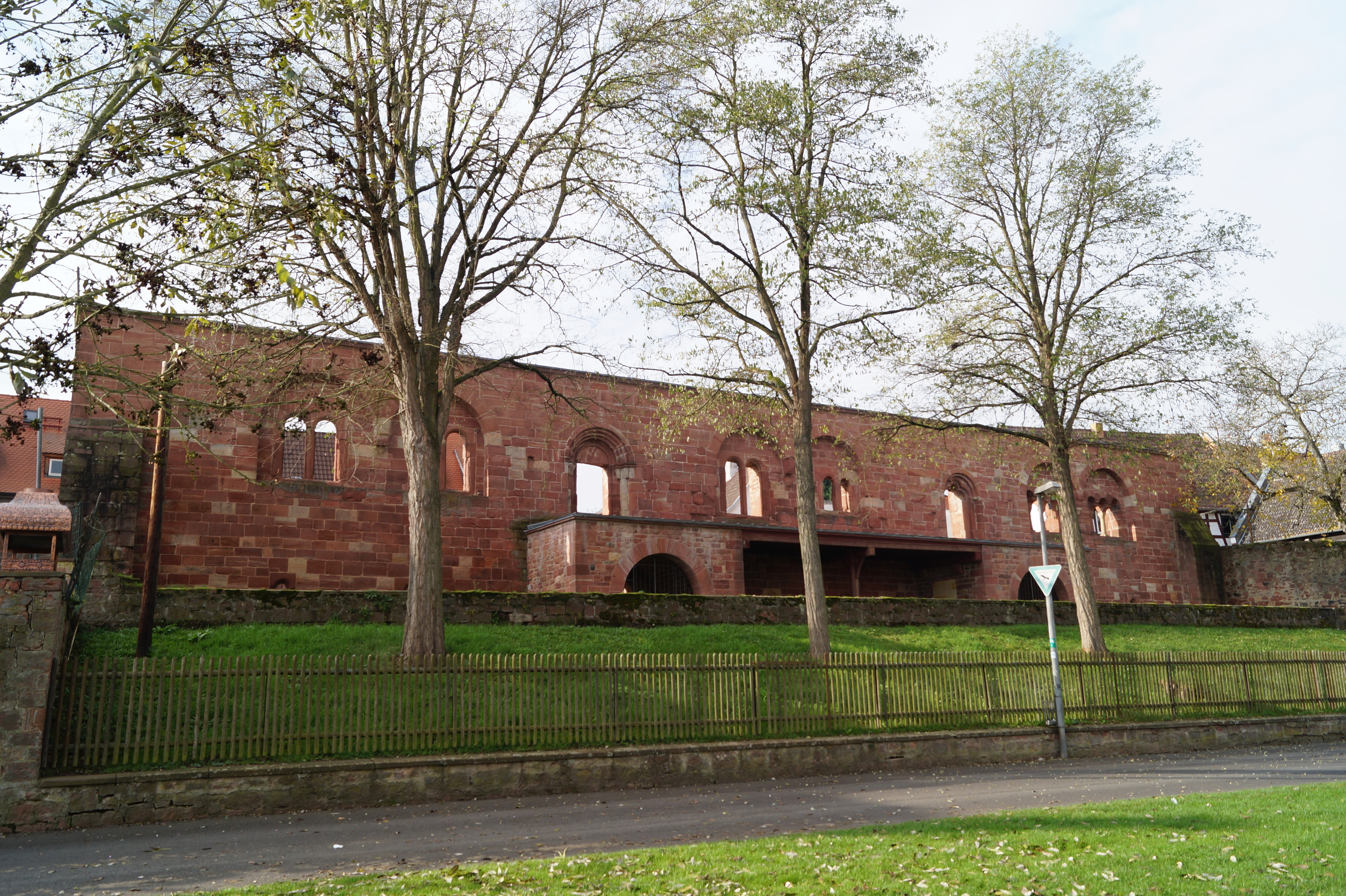 Pfalz Seligenstadt (Palatium), mainseitige Mauer